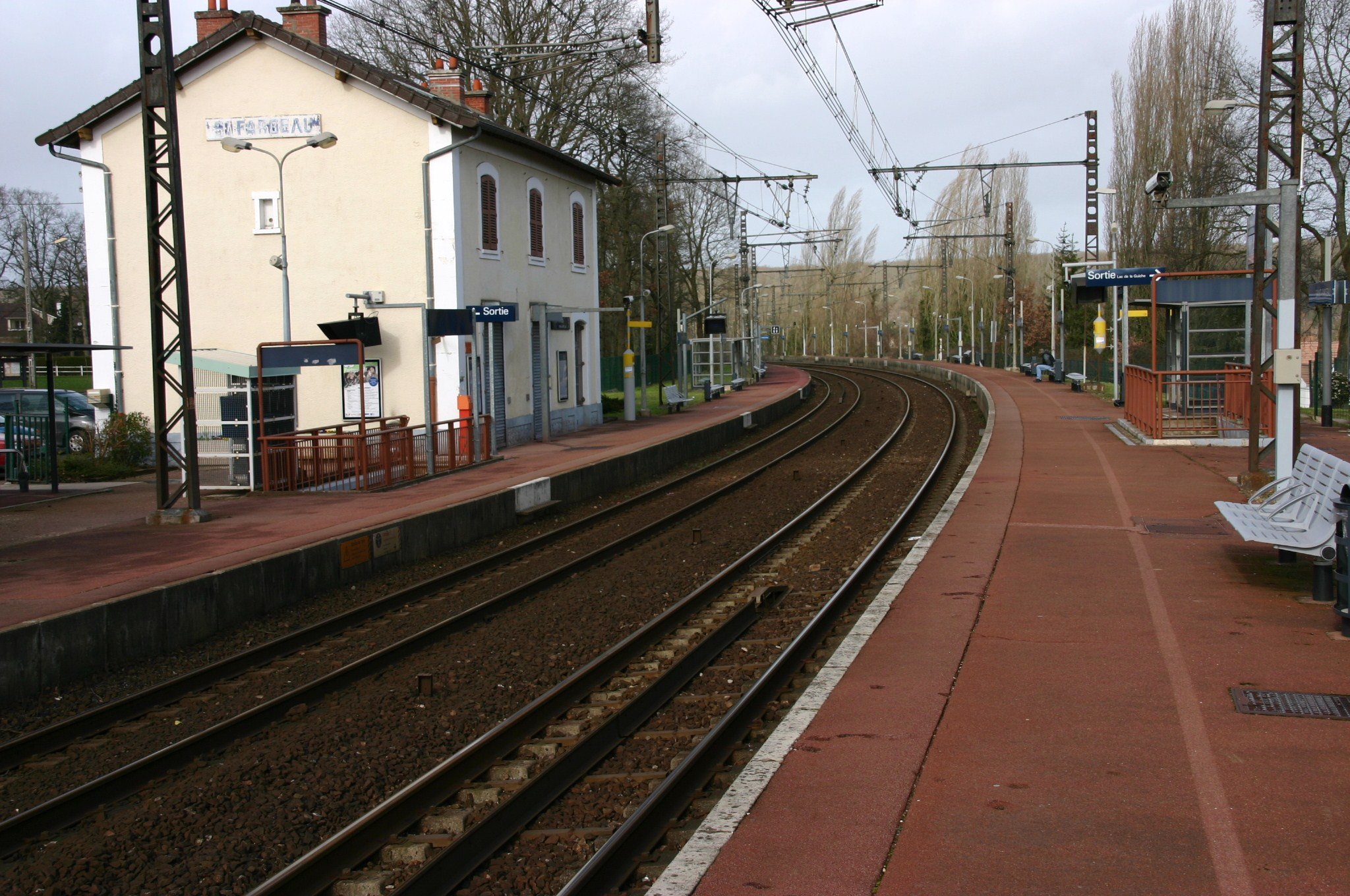 La gare de Saint-Fargeau, Saint-Fargeau-Ponthierry, département de la Seine-et-Marne (France)